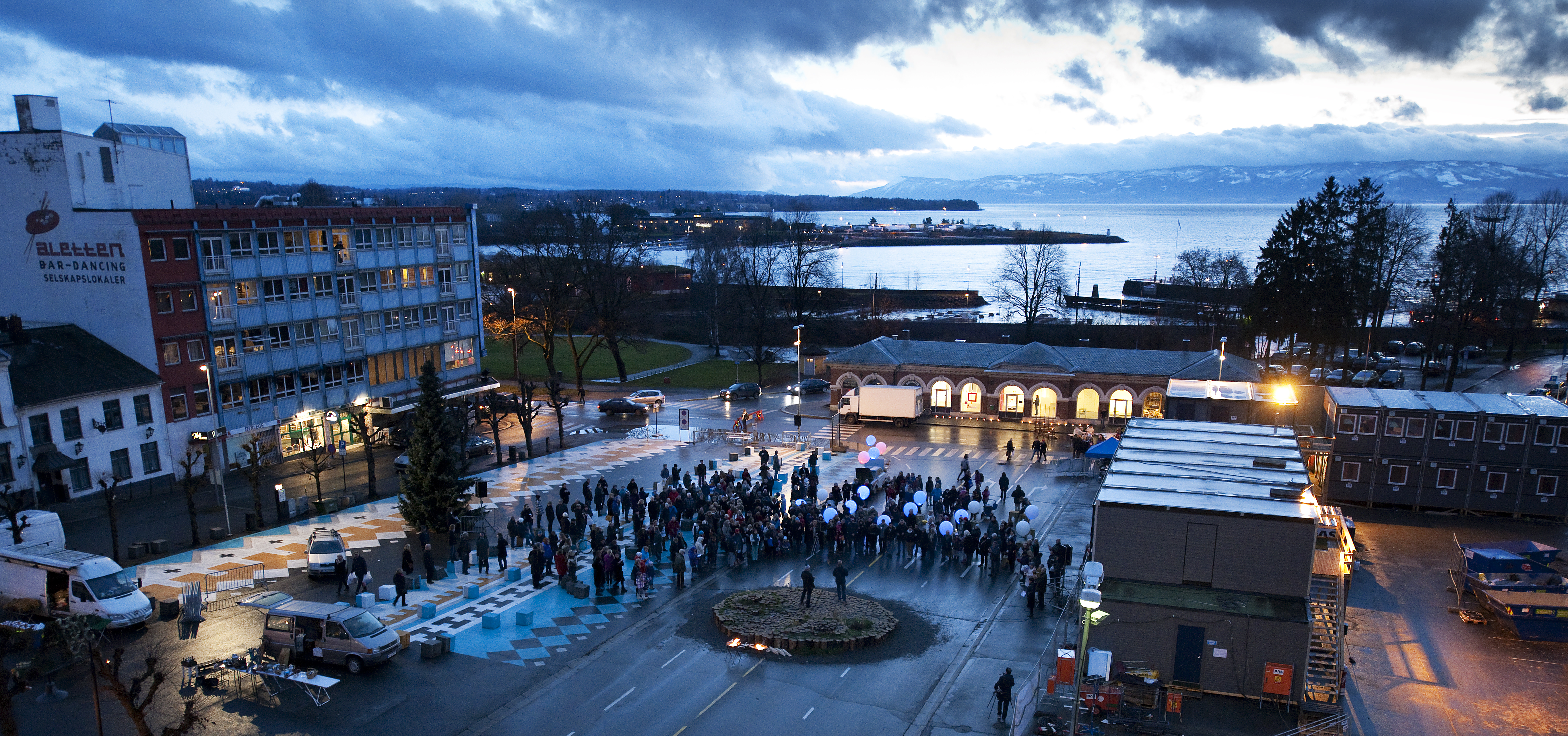 (photo: Christoffer Horsfjord Nilsen)